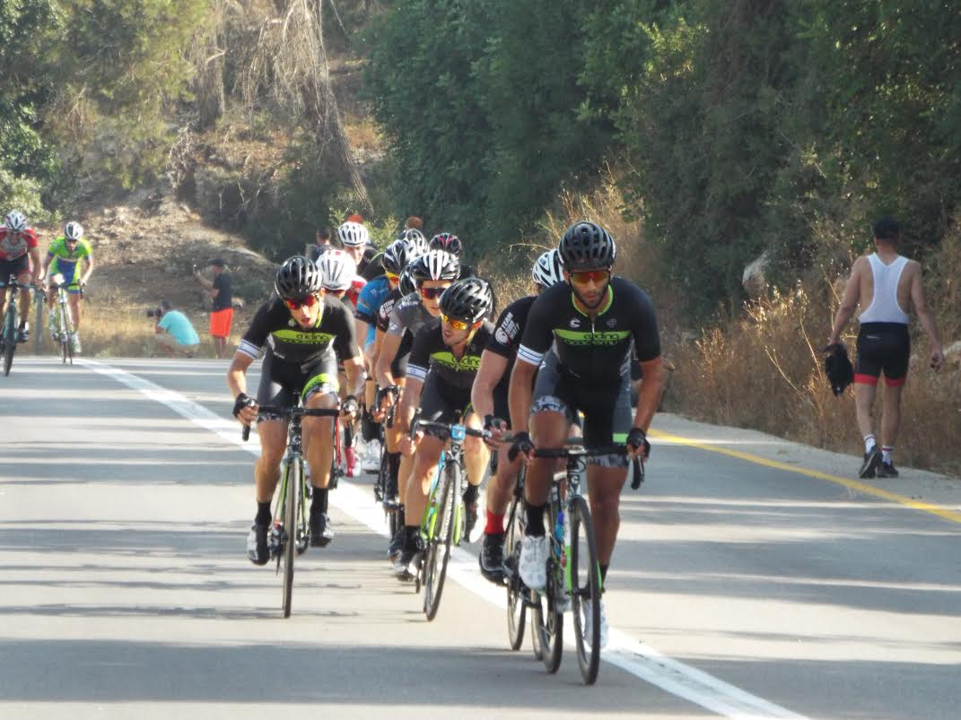 אביב יחזקאל (קבוצת סייקלינג אקדמי) מוביל את דבוקת גברים עילית בסיום הסיבוב השני